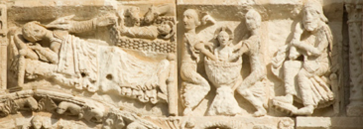 Un détail de la façade de l'Église Notre-Dame la Grande ; il représente Marie alitée après avoir accouchée de Jésus qu'elle montre du bras gauche. A côté, deux sage-femmes baignent le nouveau-né dans une bassine en forme de calice.